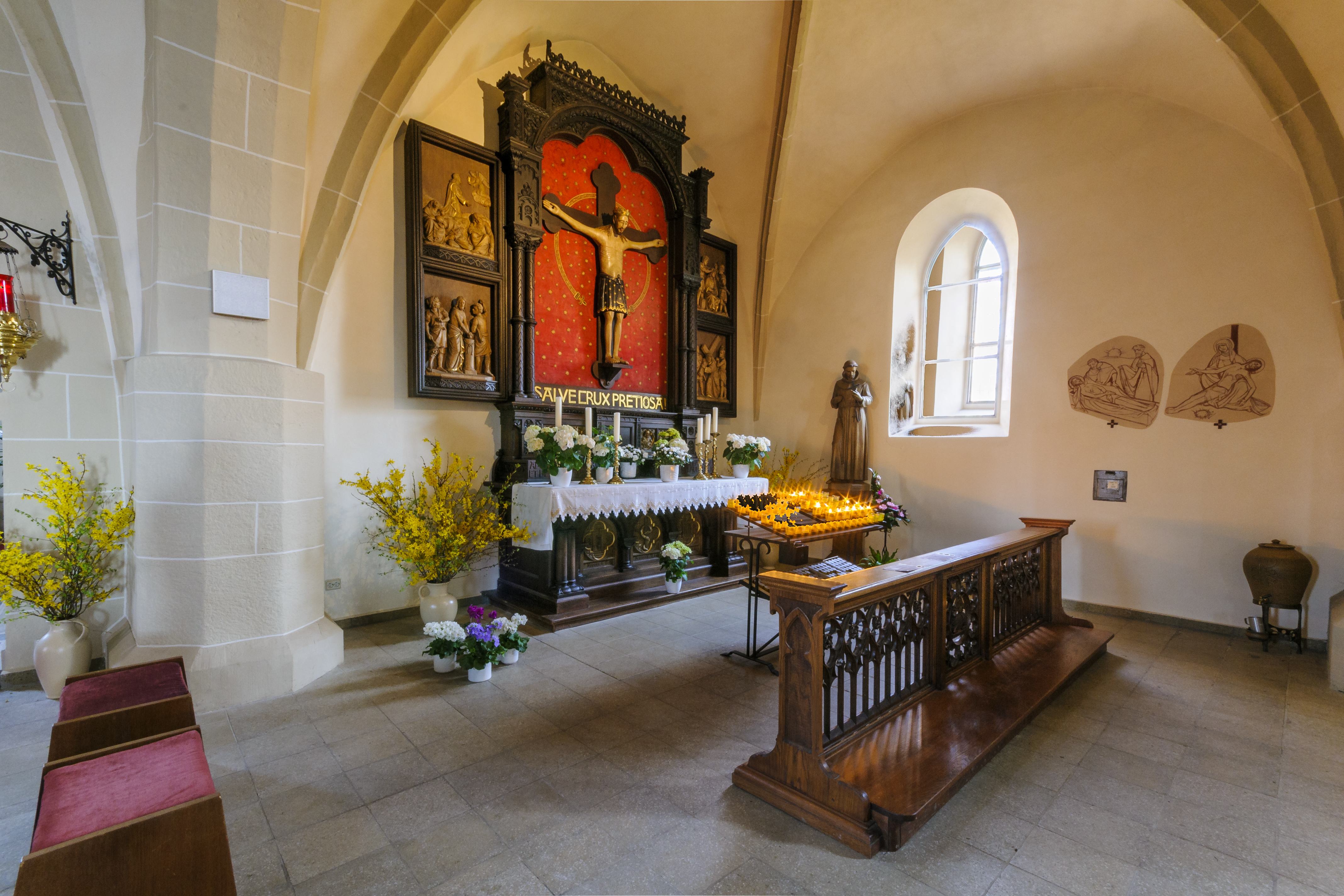 Hülfensberg Erlöserkirche St. Salvator rechter Altar mit Kruzifix